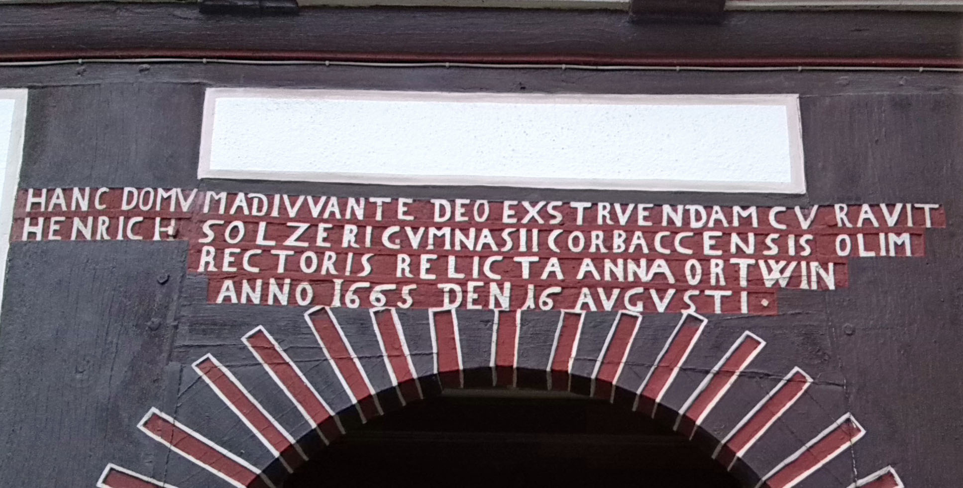 Inschrift von 1665 des H.Sölzer-Hauses, Kirchstr. 22 in 34497 Korbach, Deutschland